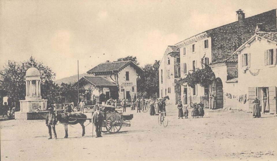 Piazza San Rocco a Pedemonte (frazione di San Pietro in Cariano, provincia di Verona) in una foto di inizio XX secolo